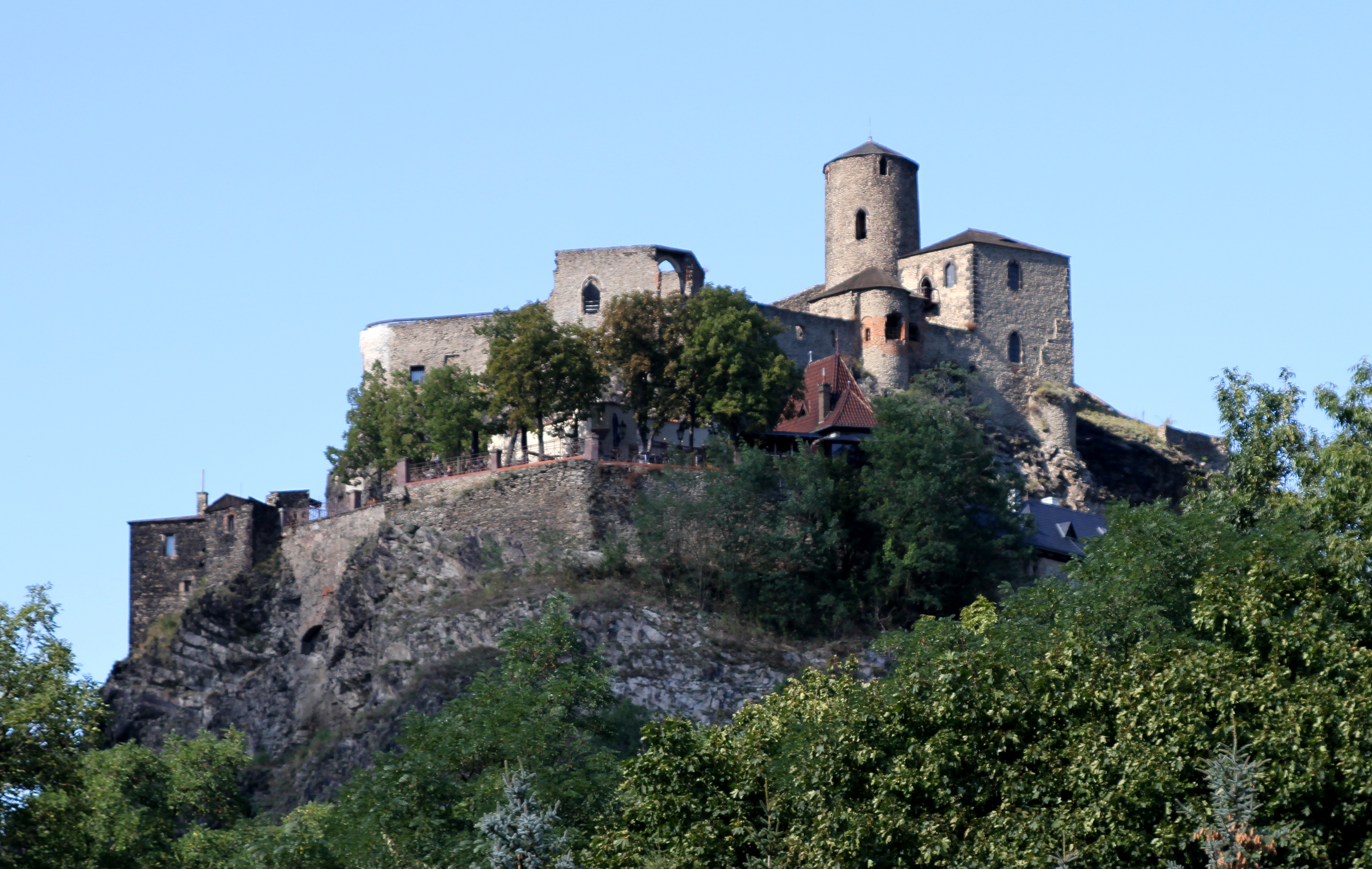 Hrad Střekov, zřícenina (Střekov), Střekov